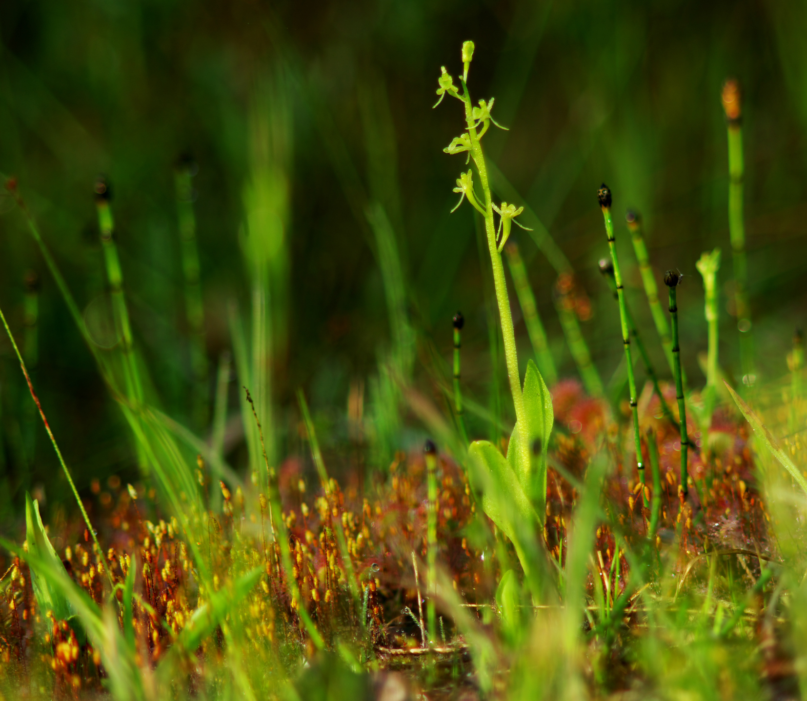 Lipiennik Loesela (Liparis loeselii)